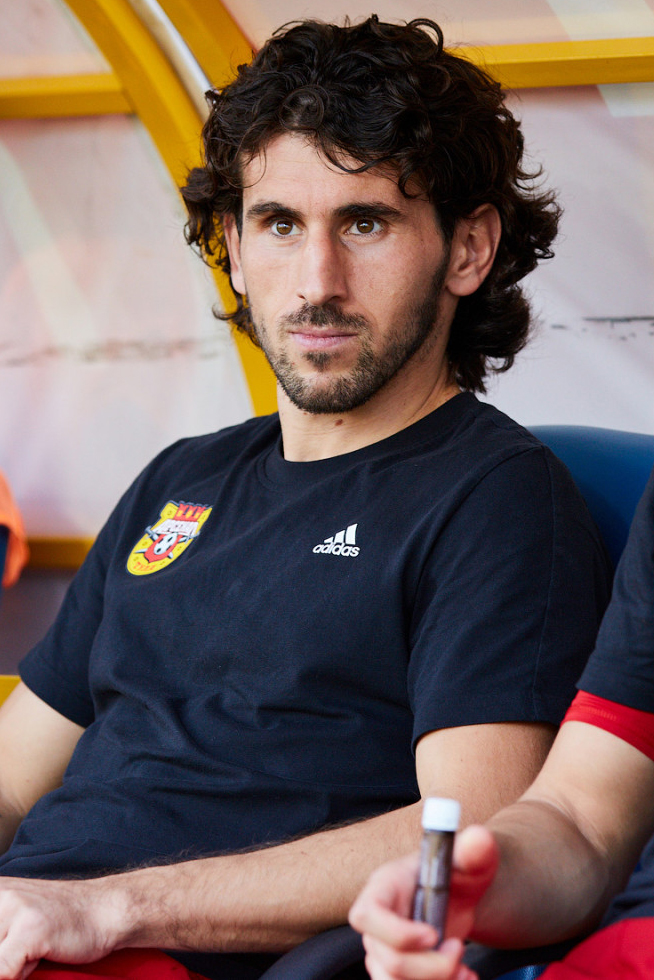 «Ростов» - «Арсенал»